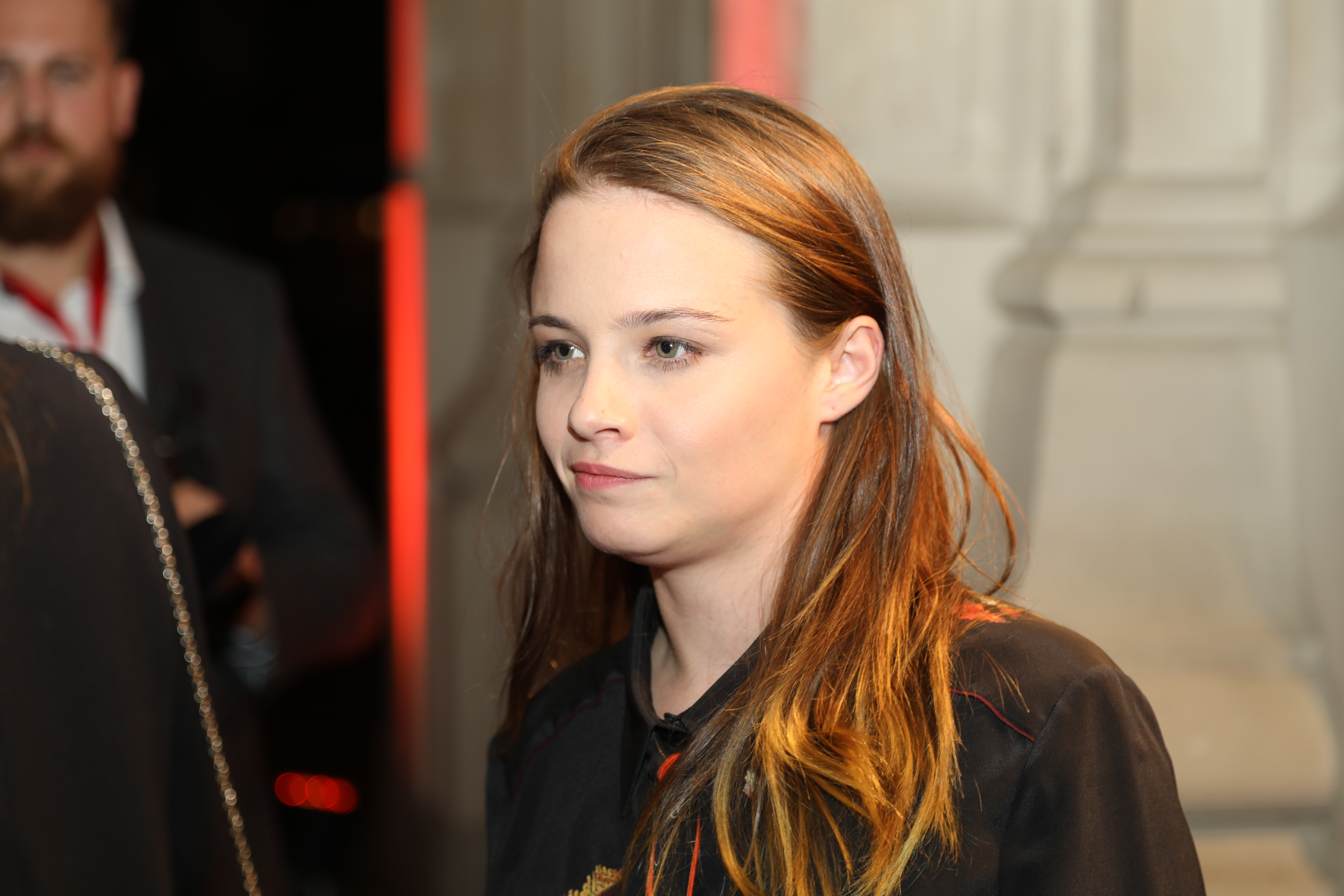 Jasna Fritzi Bauer beim Hessischen Film- und Kinopreis 2017